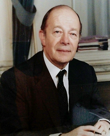 Homme politique